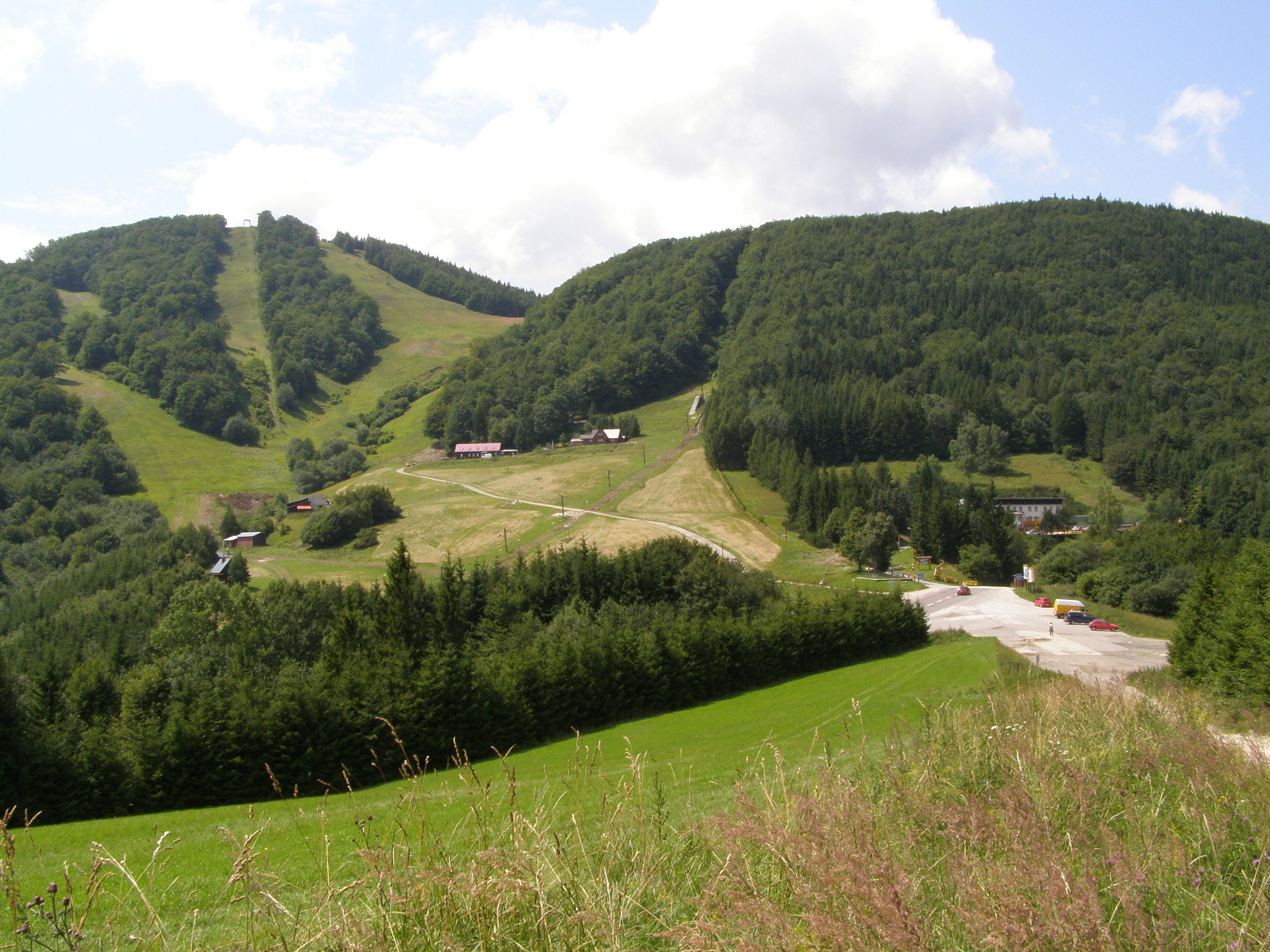 Lúčanská Fatra, Fačkovské sedlo